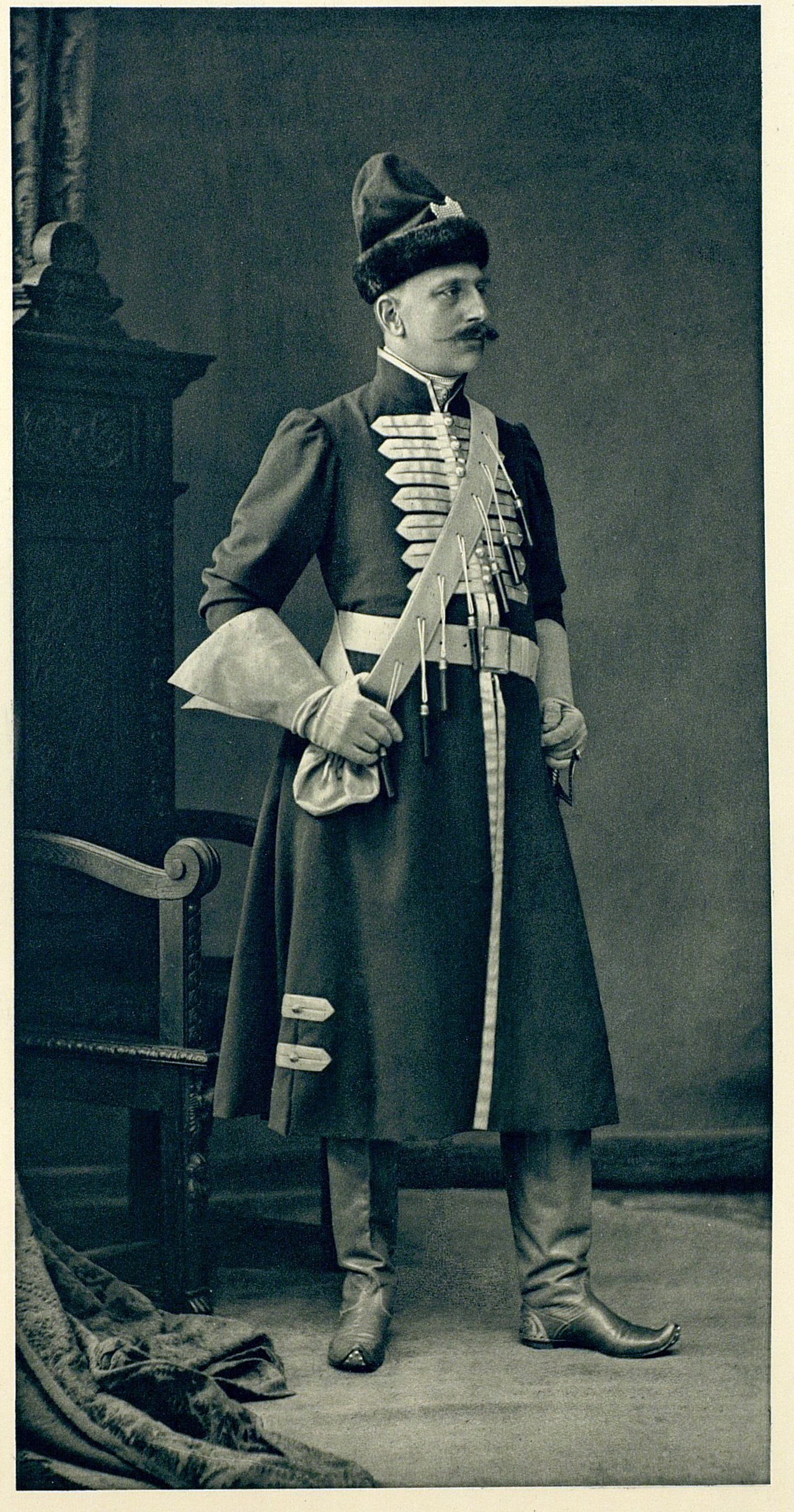 Герцог Георгий Георгиевич Мекленбург-Стрелицкий - "Стрелец стремянного полка царя Алексея Михайловича